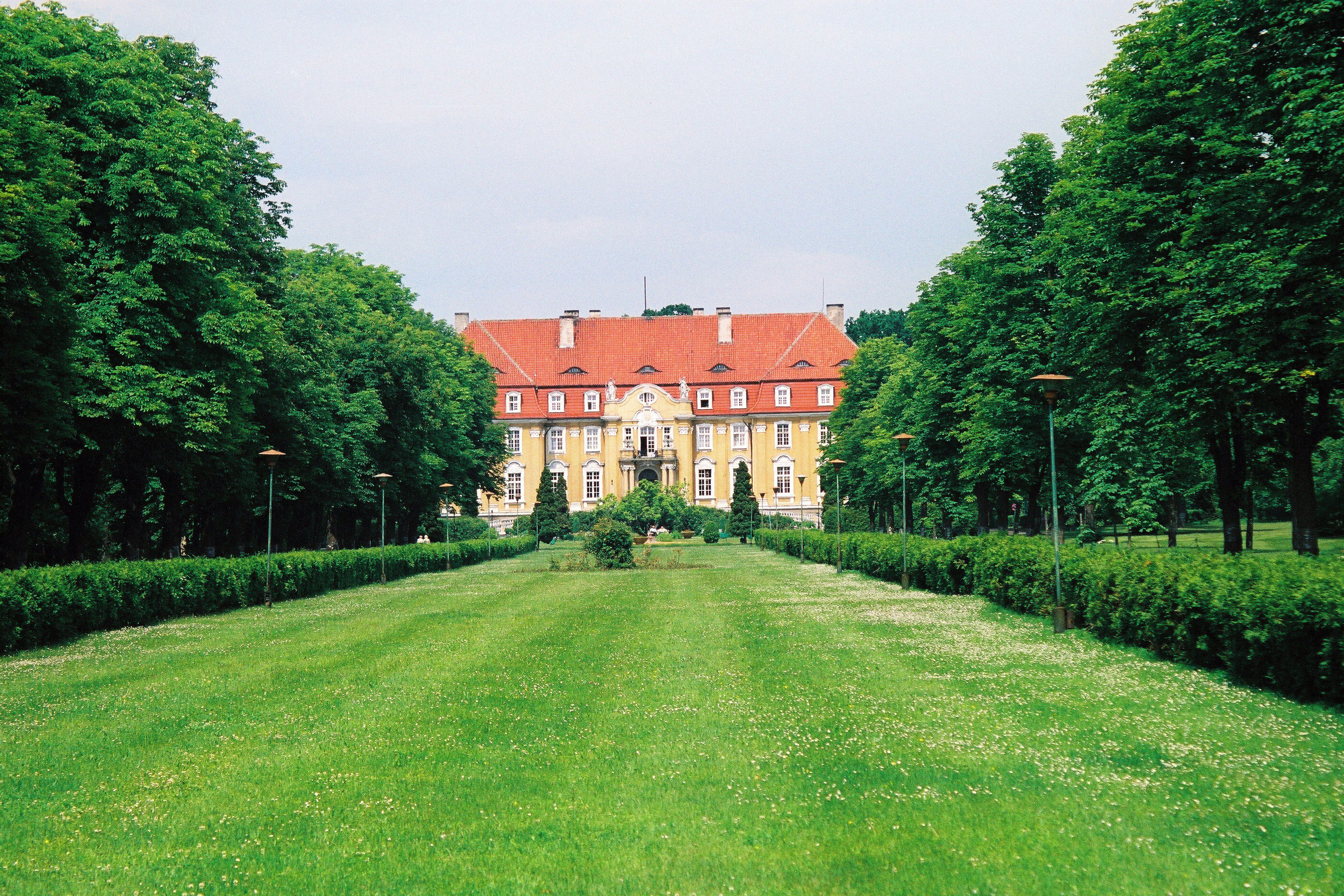 Pałac w Kochcicach